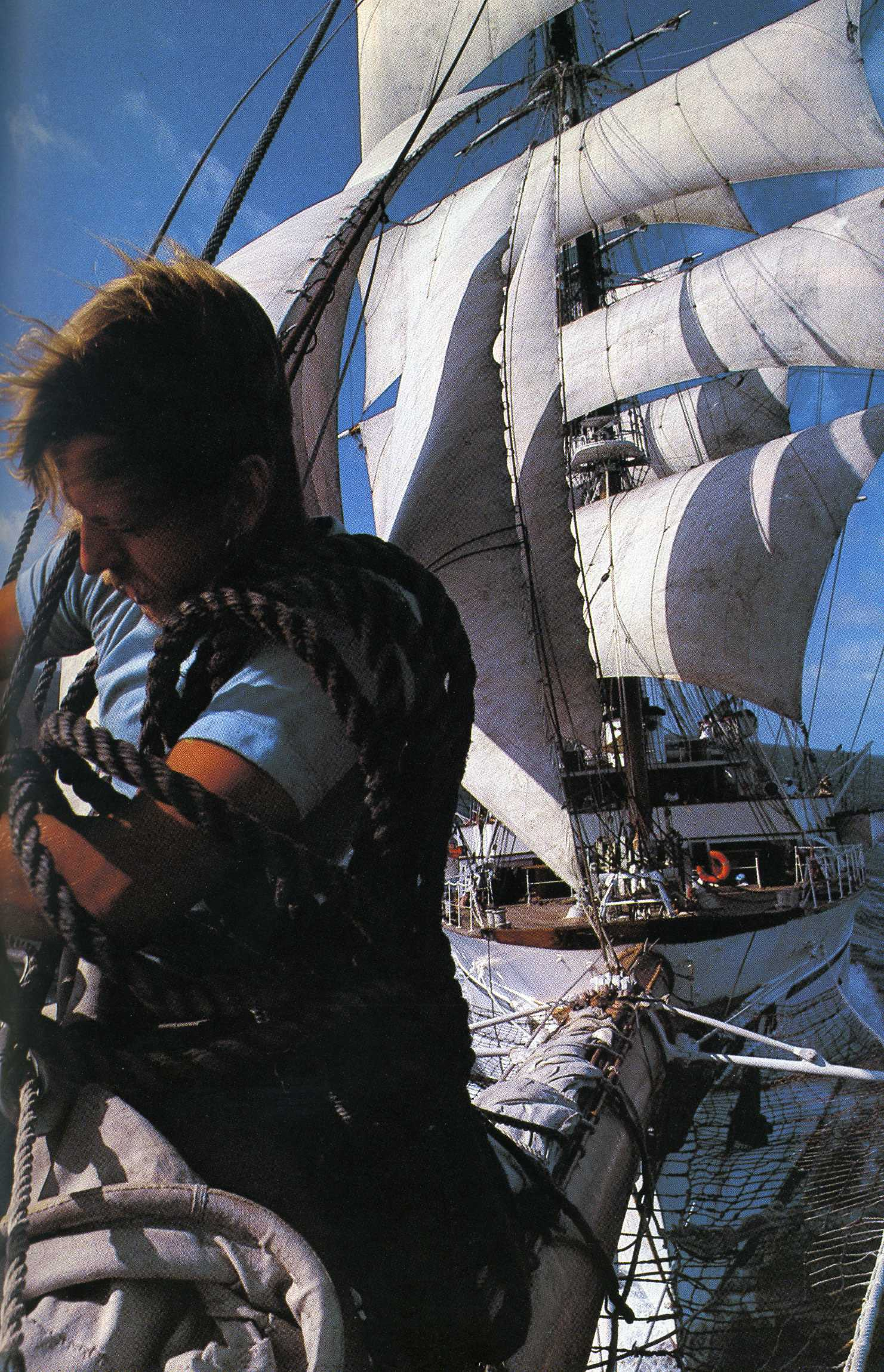 Klüverbaum